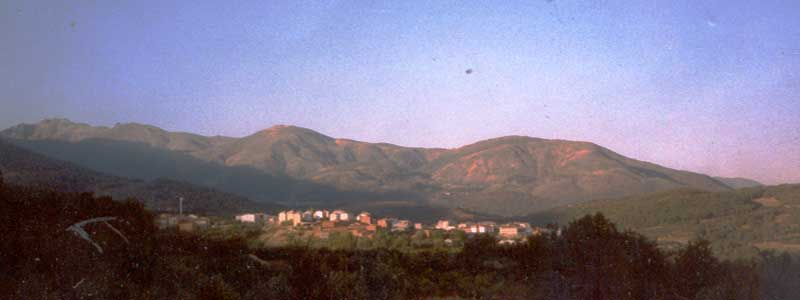 Panoramo.